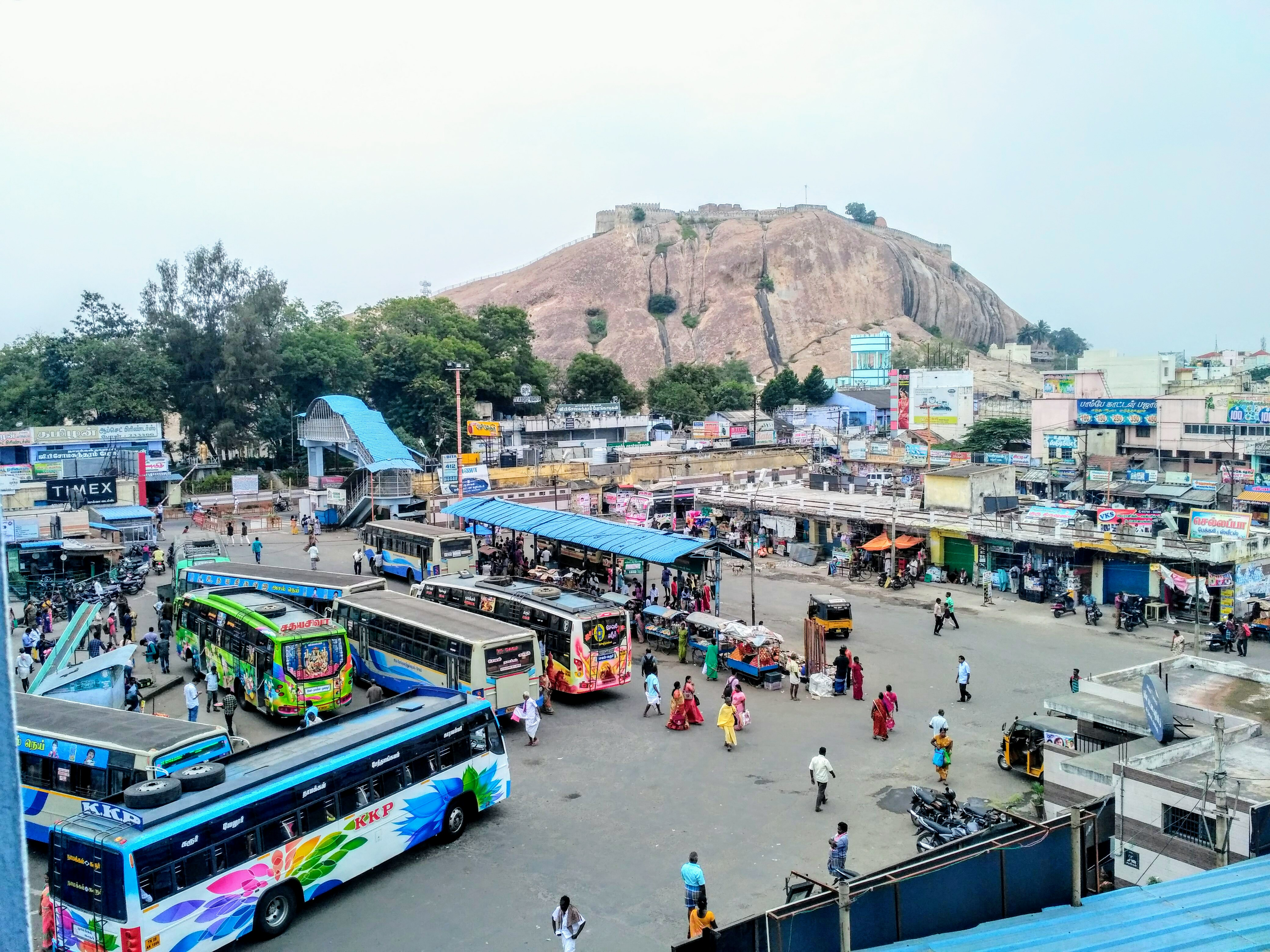 நாமக்கல் பேருந்து நிலையத்துடன், மலைக்கோட்டை..